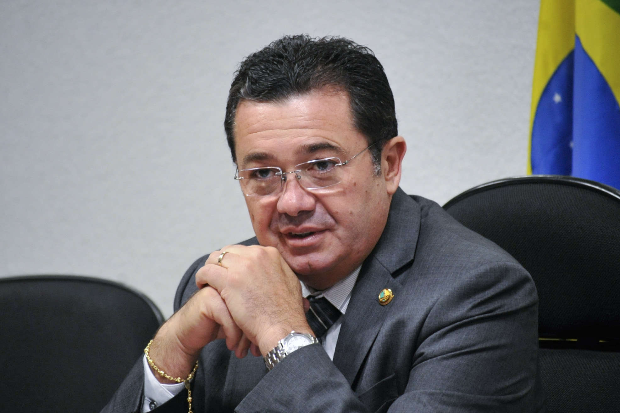 O presidente do colegiado, senador Vital do Rêgo (PMDB-PB), conduz reunião para ouvir o gerente de Engenharia de Custos da Petrobras, Alexandre Rabello Foto: Geraldo Magela/Agência Senado